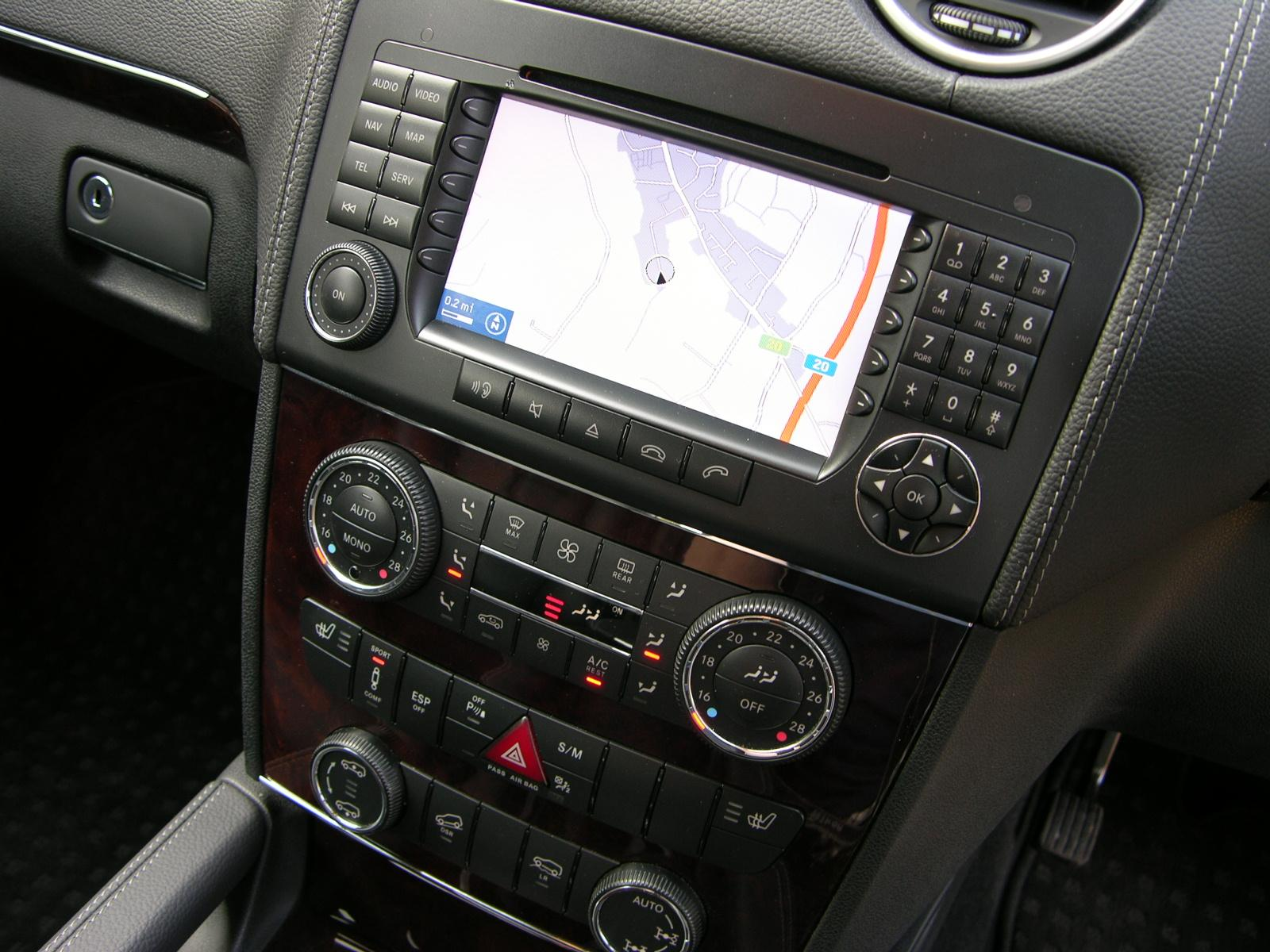 Mercedes Benz GL420 CDi 4-Matic